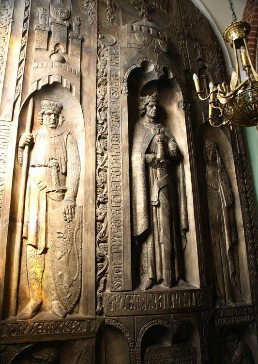 Przemysł II, Polska